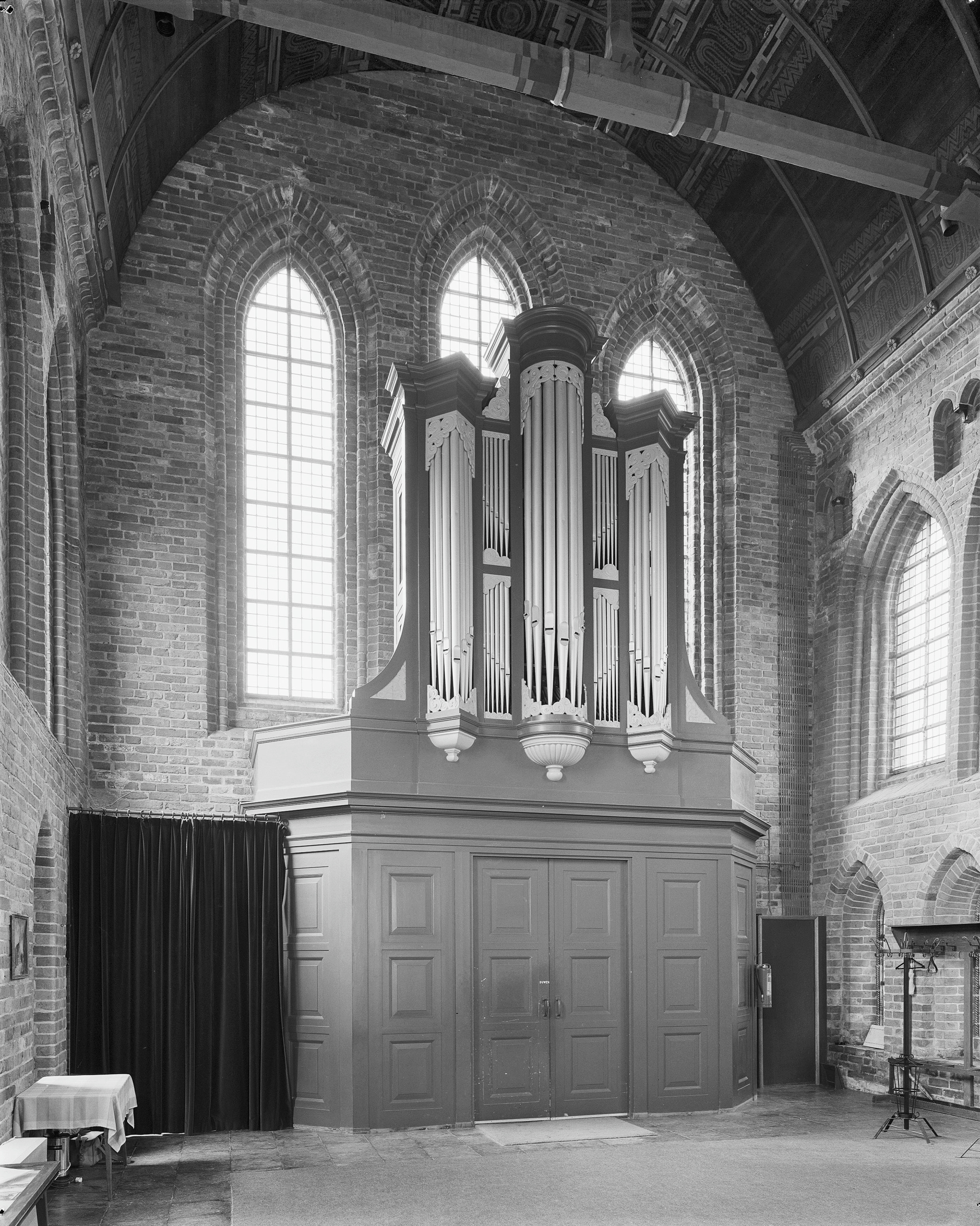 Nederlands Hervormde Kerk: INTERIEUR, ORGEL